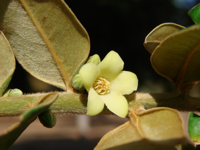 Diospyros sericea A. DC. - EBENACEAE - Bosque do IBAMA - Brasília - Distrito Federal - Brasil.